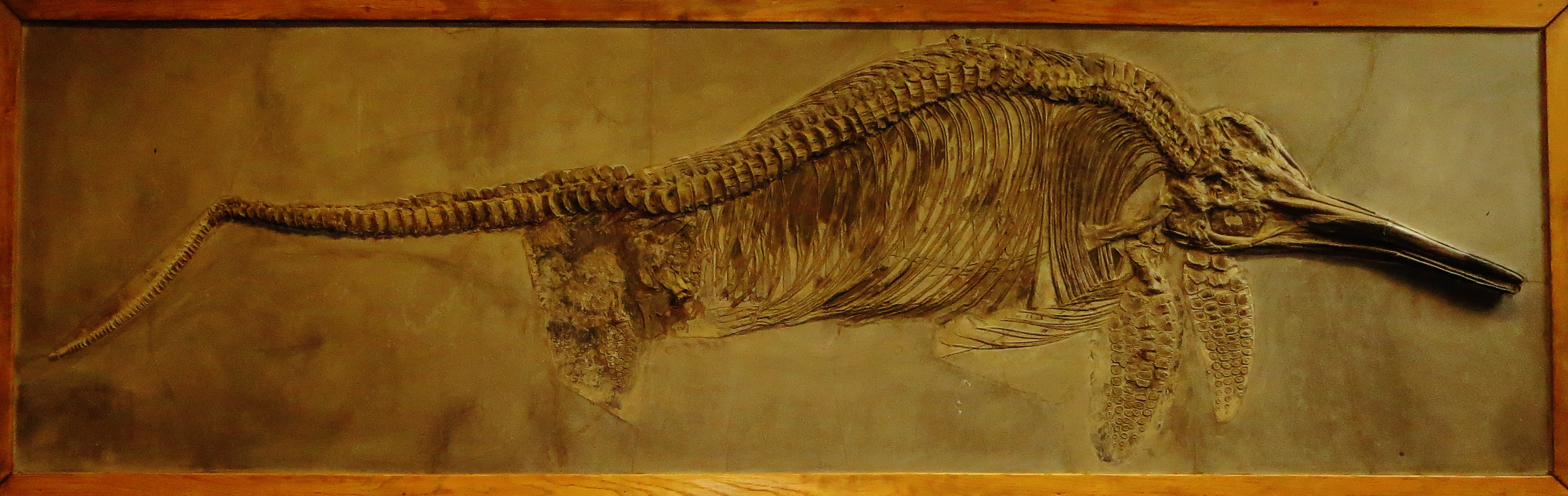 Fossil of Stenopterygius, an extinct reptile- Took the picture at Museum of Paleontology at Tuebingen